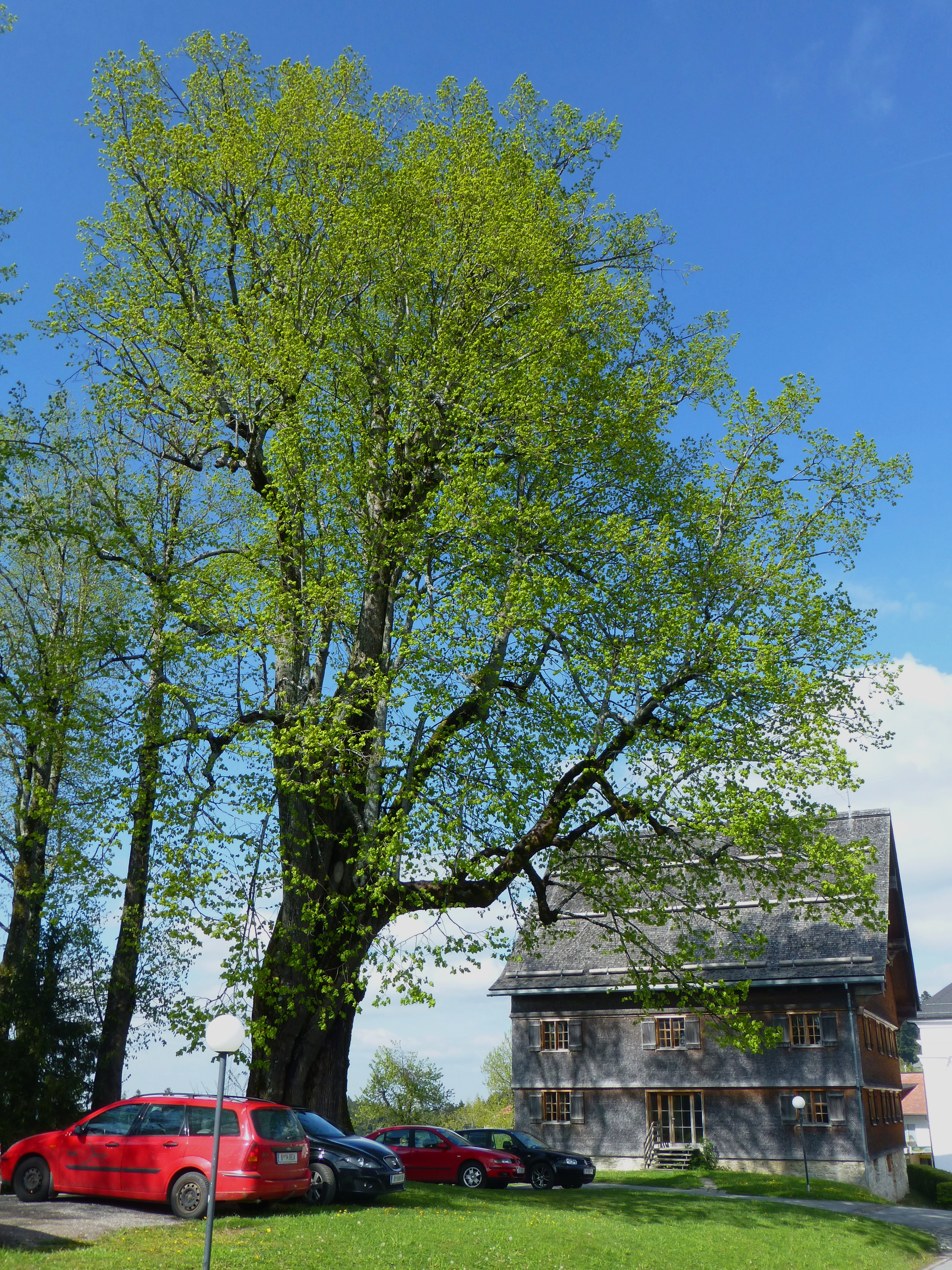 Naturdenkmal Marienlinde in Sulzberg This media shows the natural monument in Vorarlberg with the ID 131.